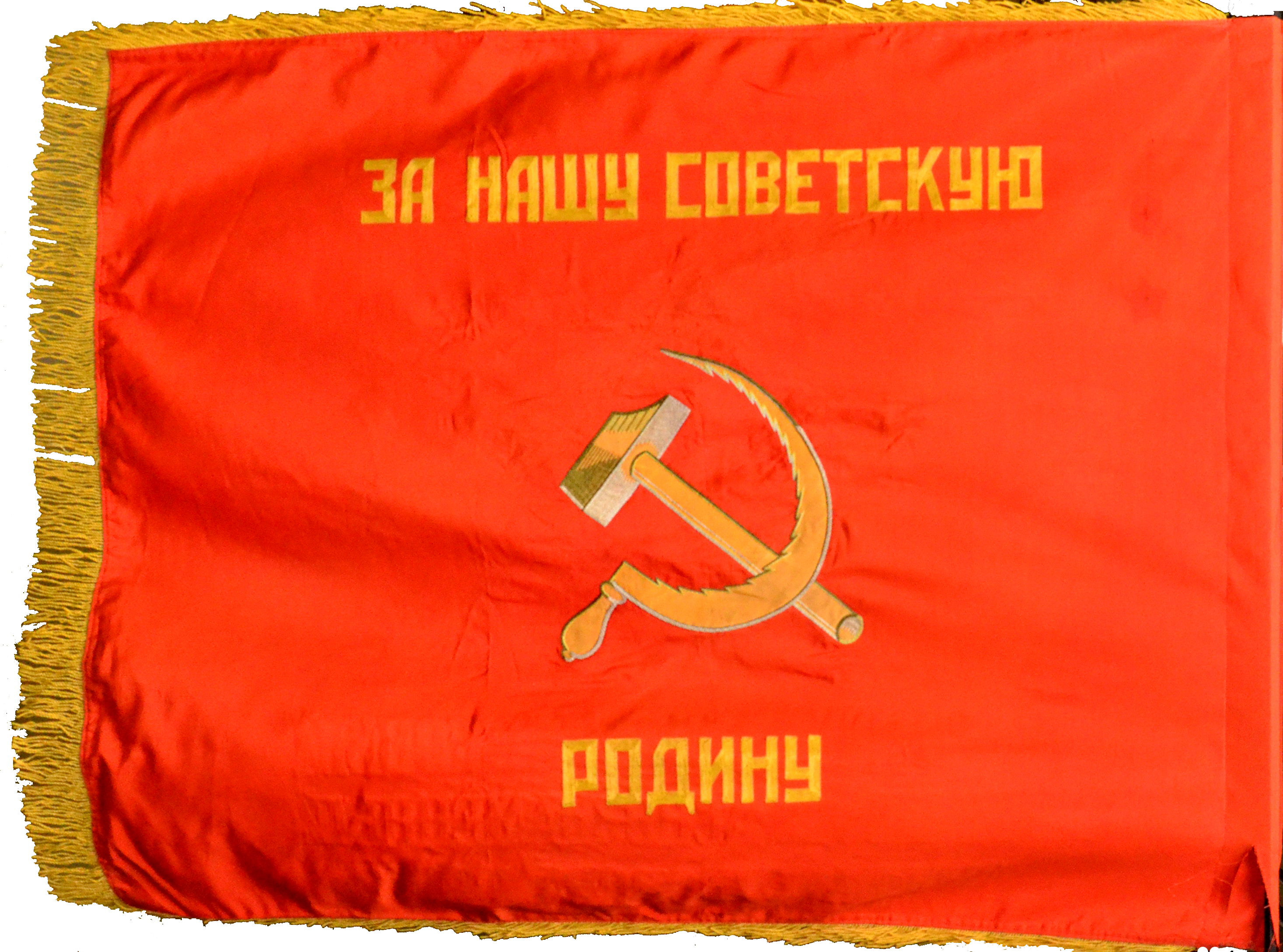 Знамя 15-го гвардейского танкового полка. Реверс